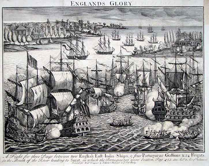 Gravure du XVIIIème siècle montrant la bataille de Swally livrée les 9/10 décembre 1612 entre des navires de la Bristish East India Company et la marine portugaise